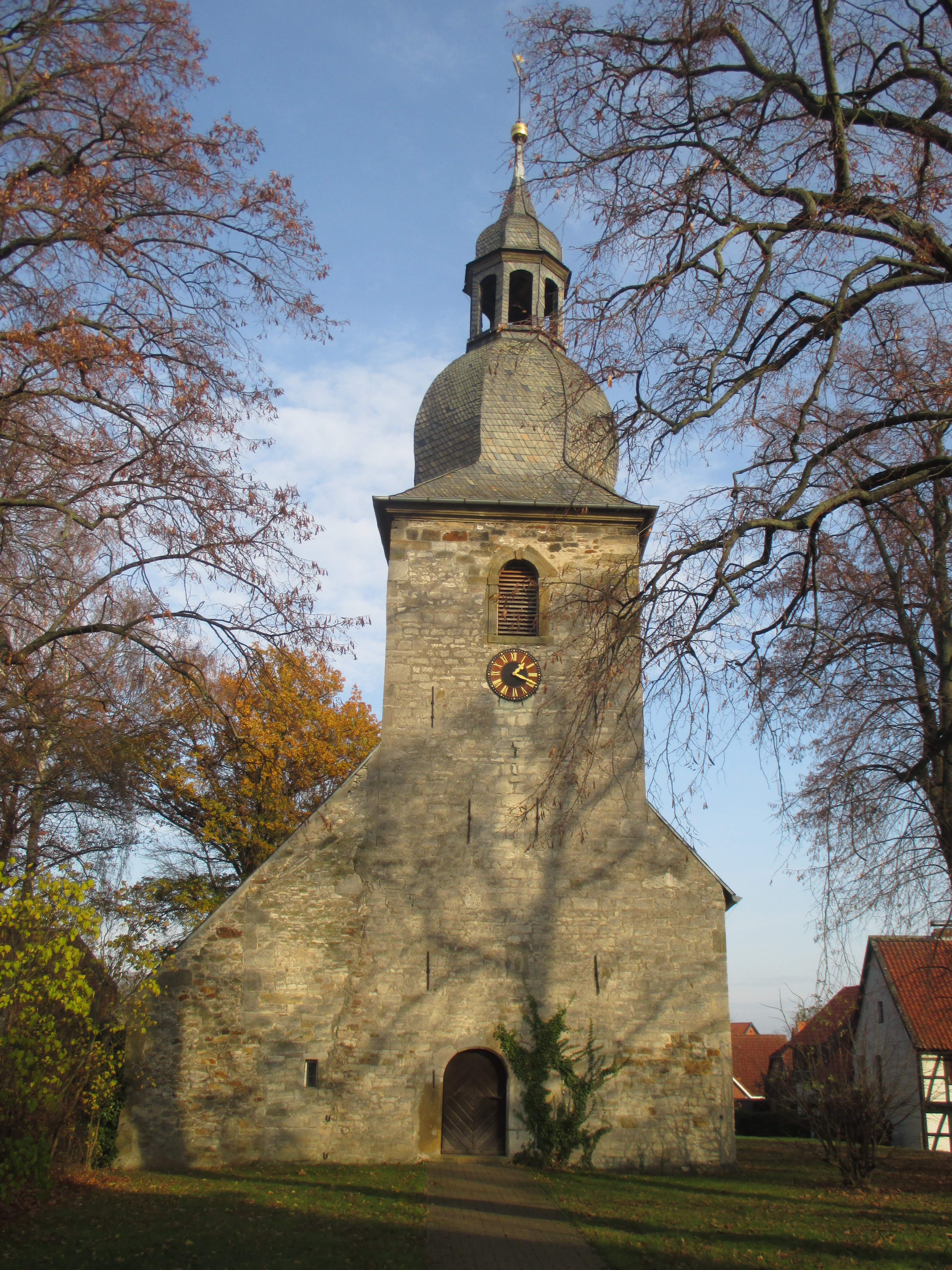 Evangelische Kirche in Burgdorf, Landkreis Wolfenbüttel